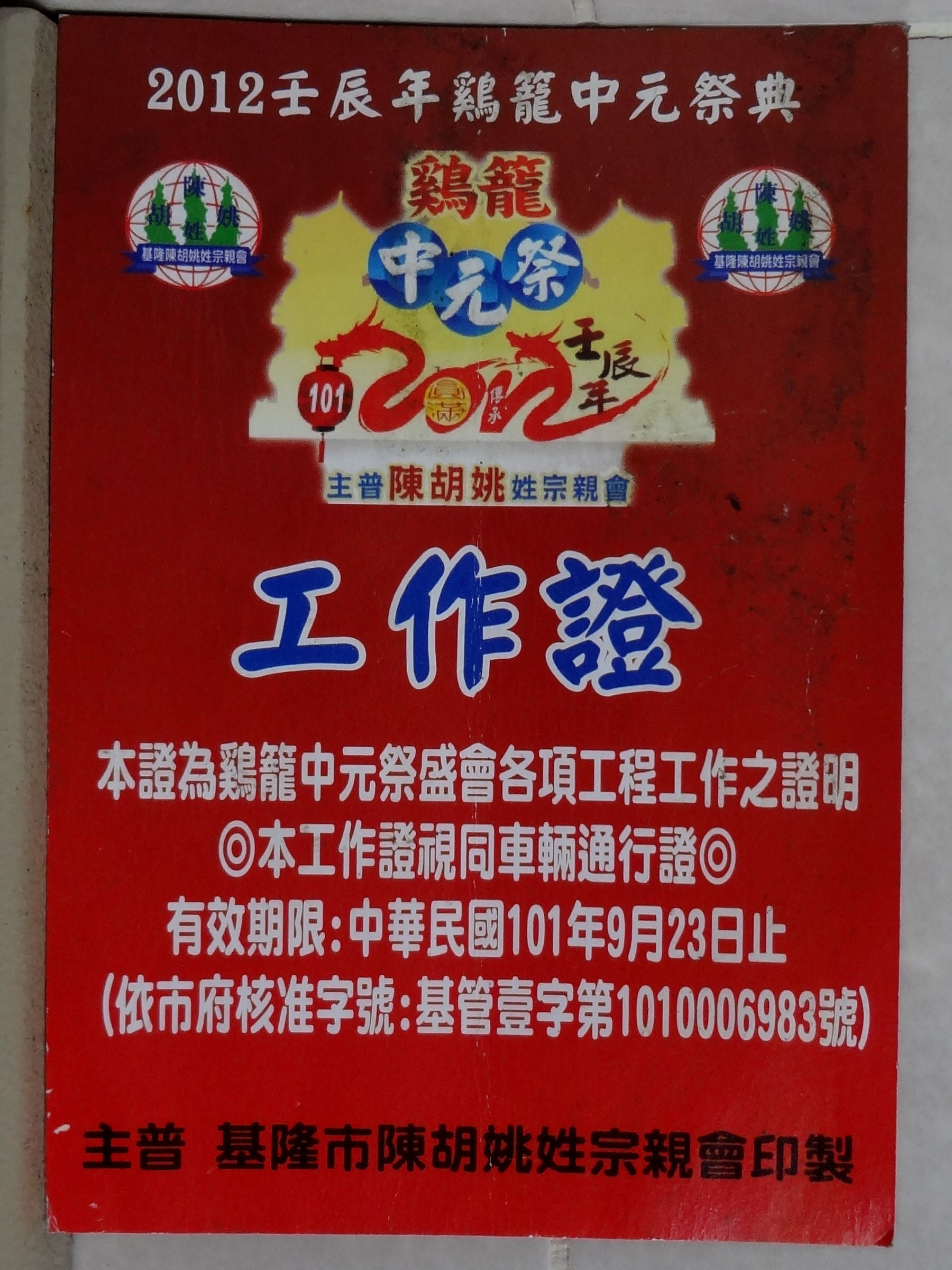 2012壬辰年雞籠中元祭工作證，基隆市陳胡姚姓宗親會印製，視同車輛通行證。